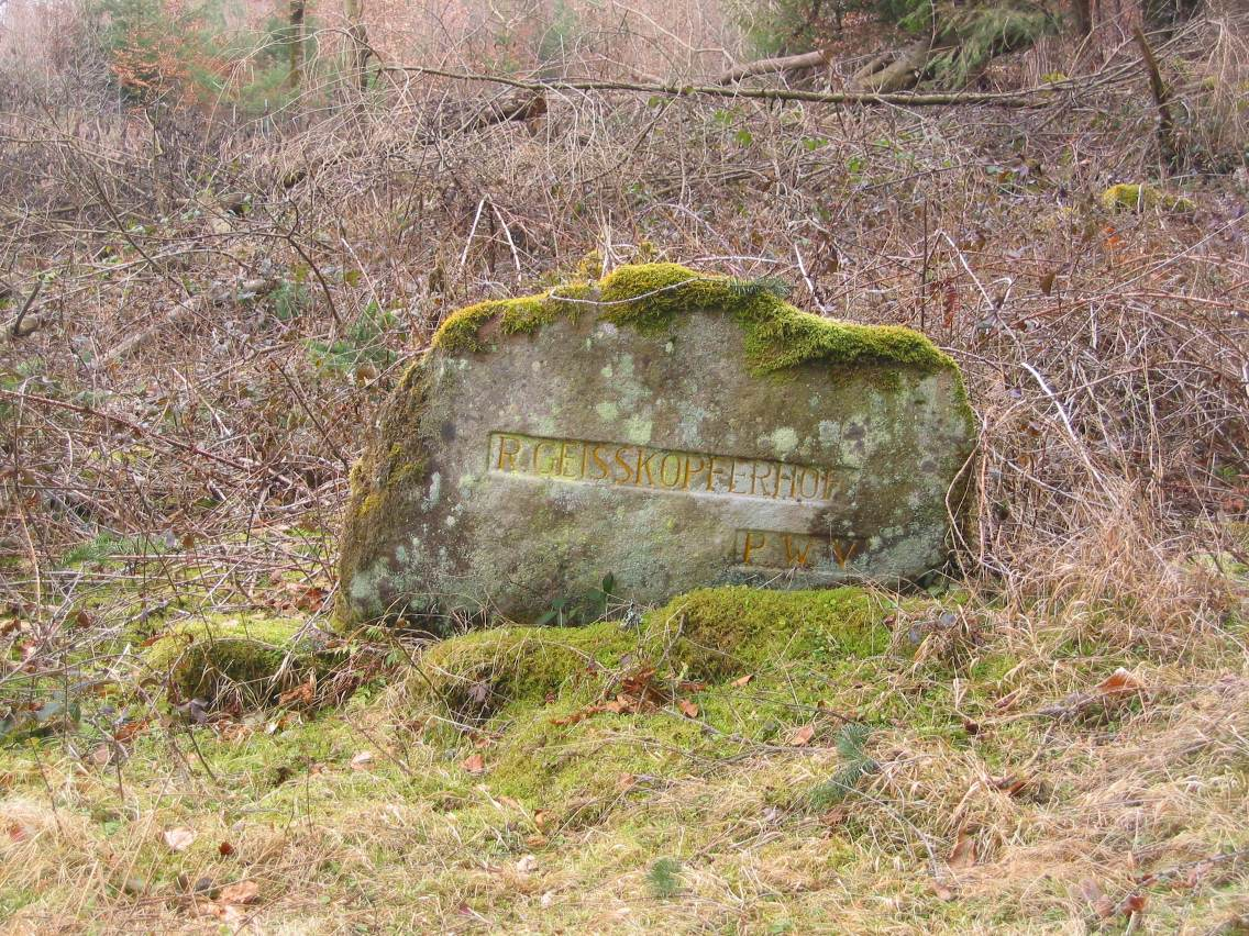 Ritterstein Nummer 186, R. Geiskopferhof